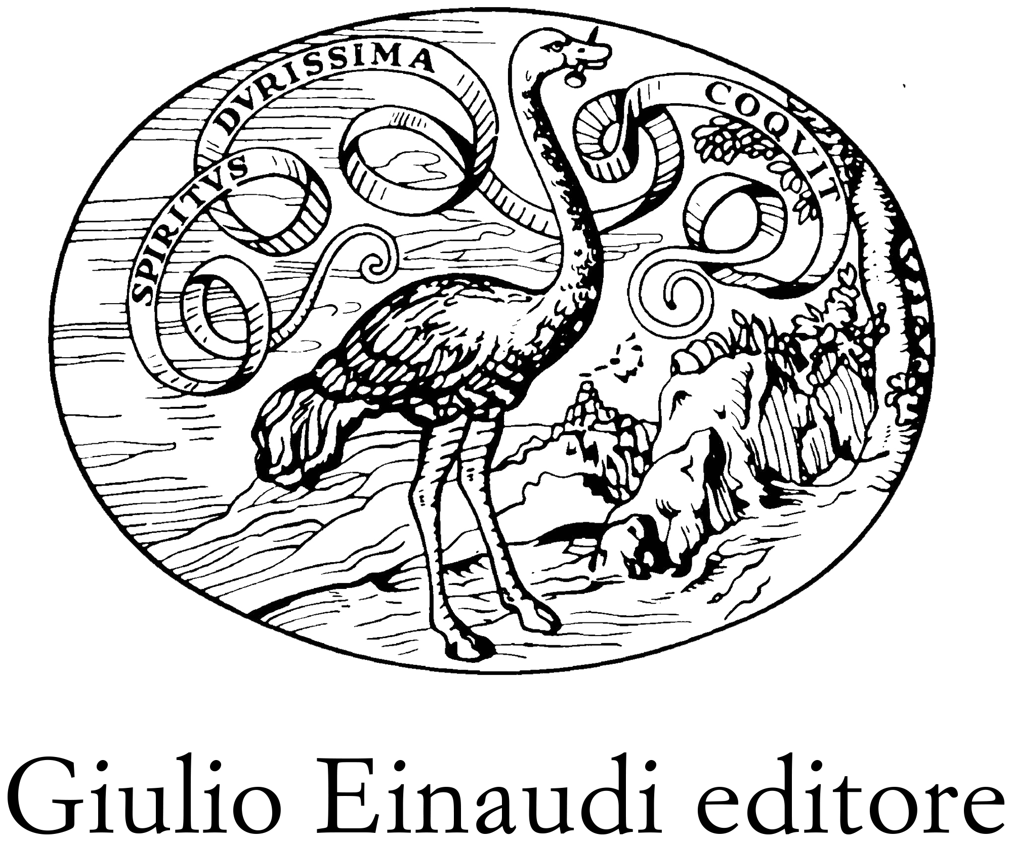 Giulio-einaudi logo ufficiale